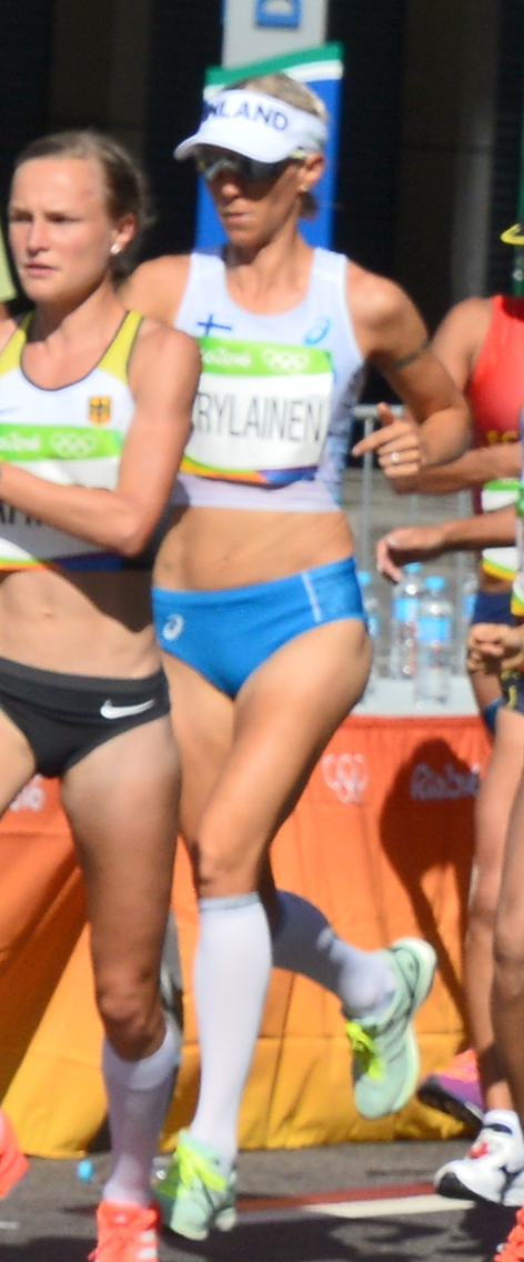 Passage du marathon des jeux olympiques de Rio 2016 dans le centre de Rio